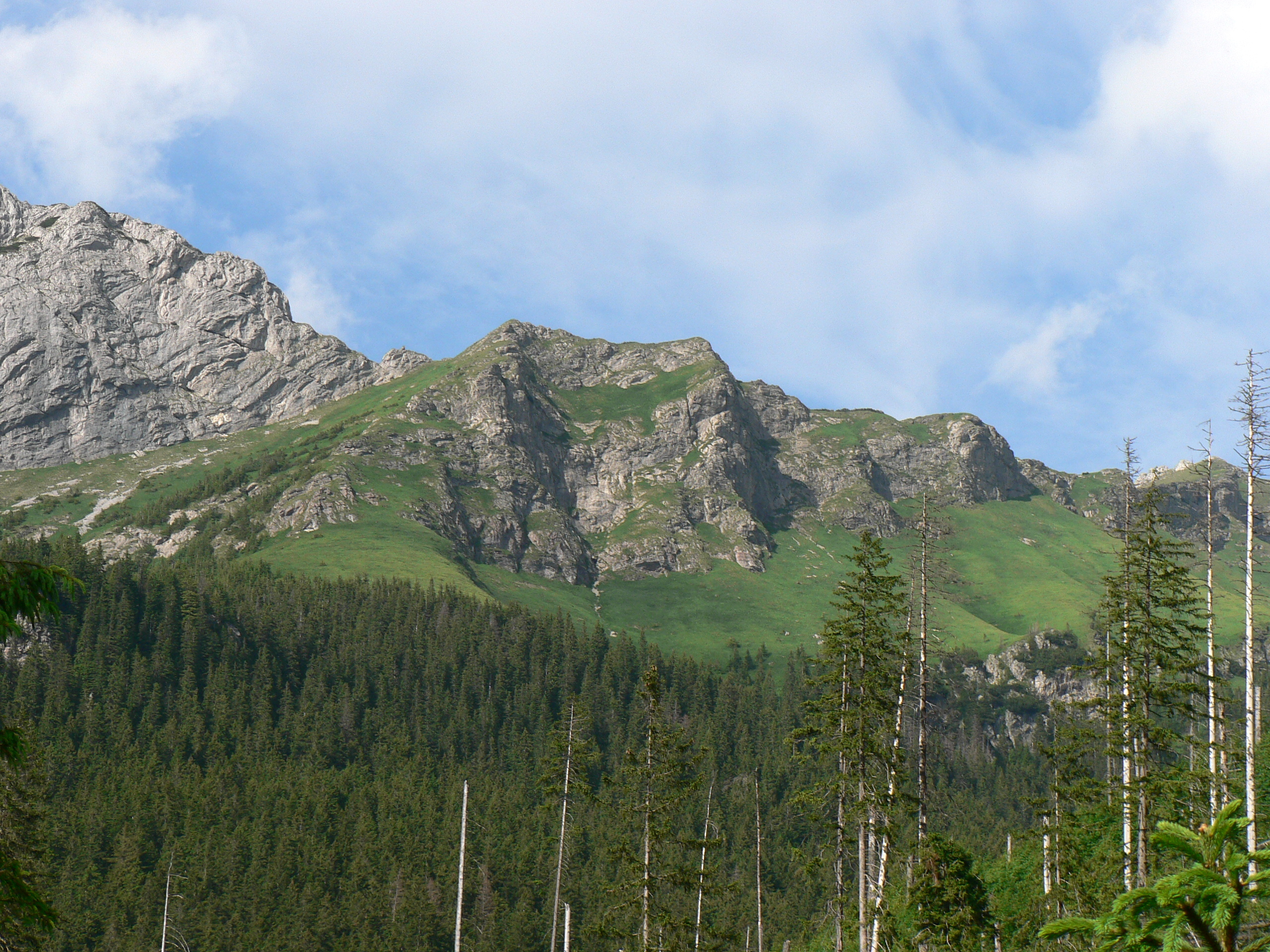 Murańskie Czubki z Doliny Zadnich Koperszadów